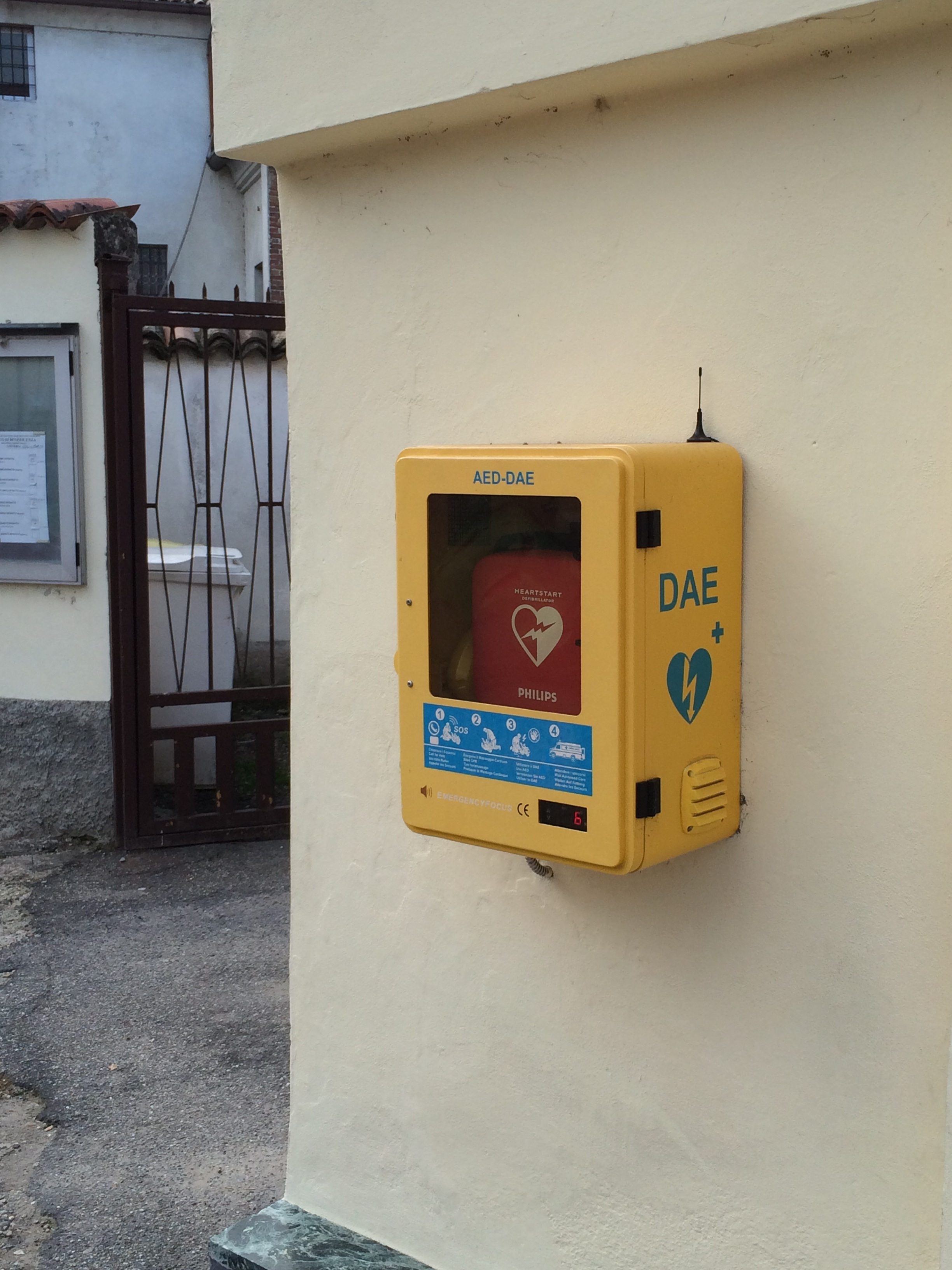 Teca con telecontrollo